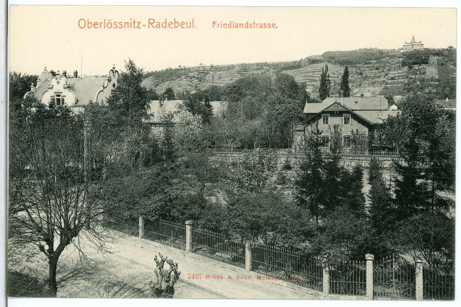 Radebeul; Oberlößnitz - Friedlandstraße This postcard is from publisher Brück & Sohn in Meißen ( postcard has a unique number 07467 and is available in a higher resolution at the publisher. This images was uploaded in a cooperation project between Wikipedians and the publisher.